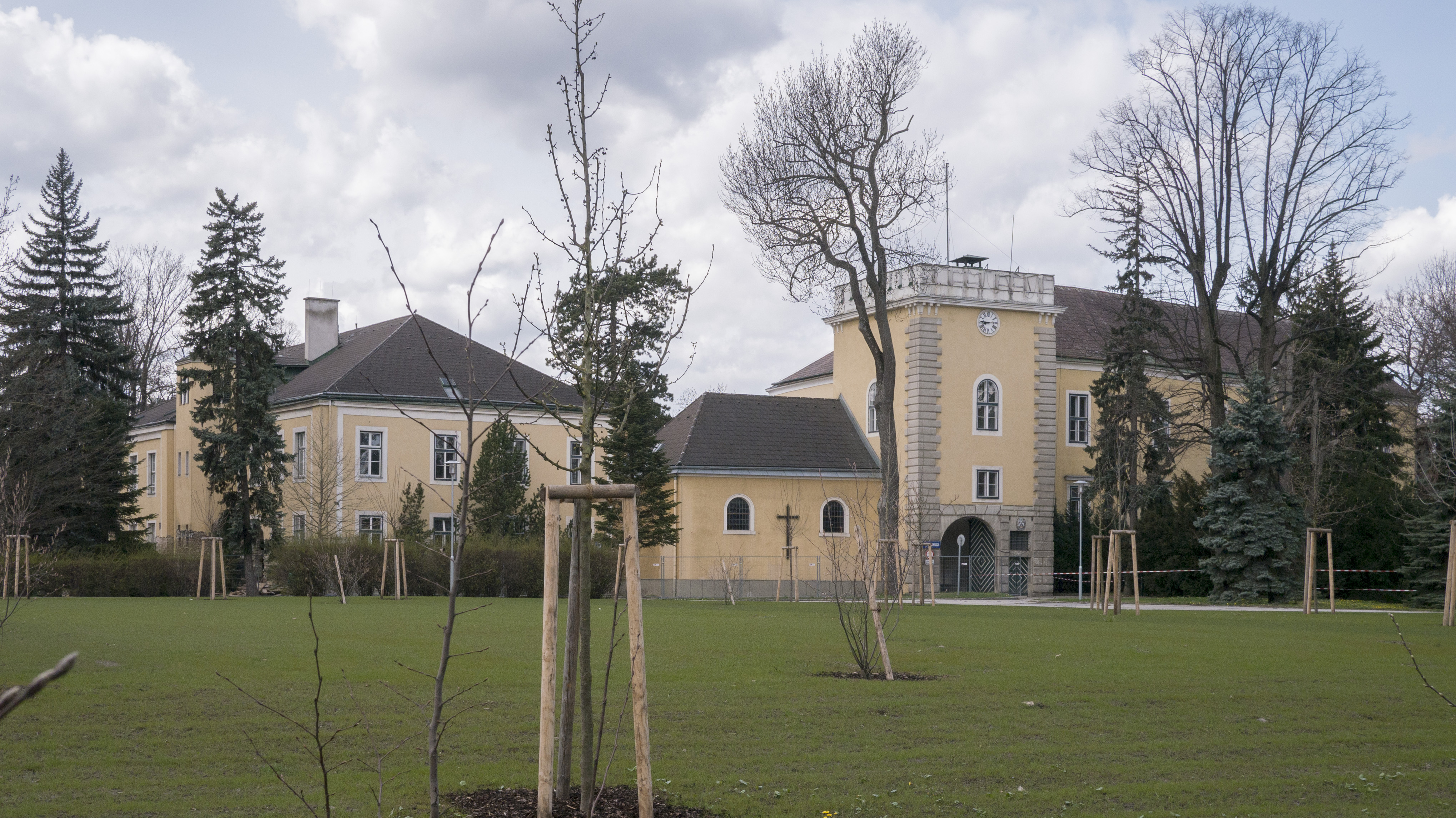 Pflegeheim/ehem. Liesinger Schloss